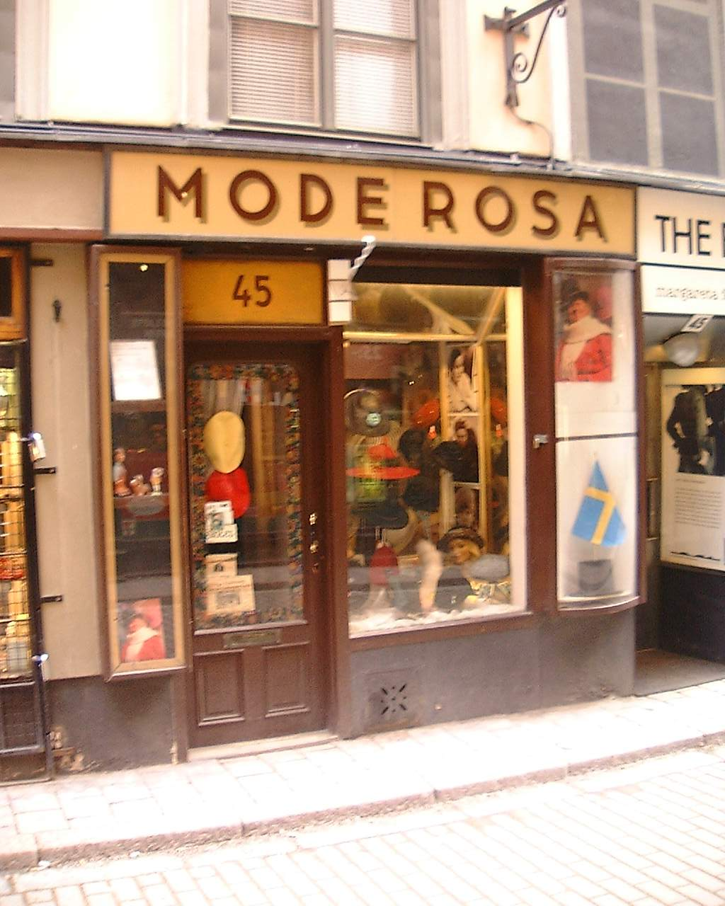 Front of 45, Västerlånggatan. Gamla stan, Stockholm.